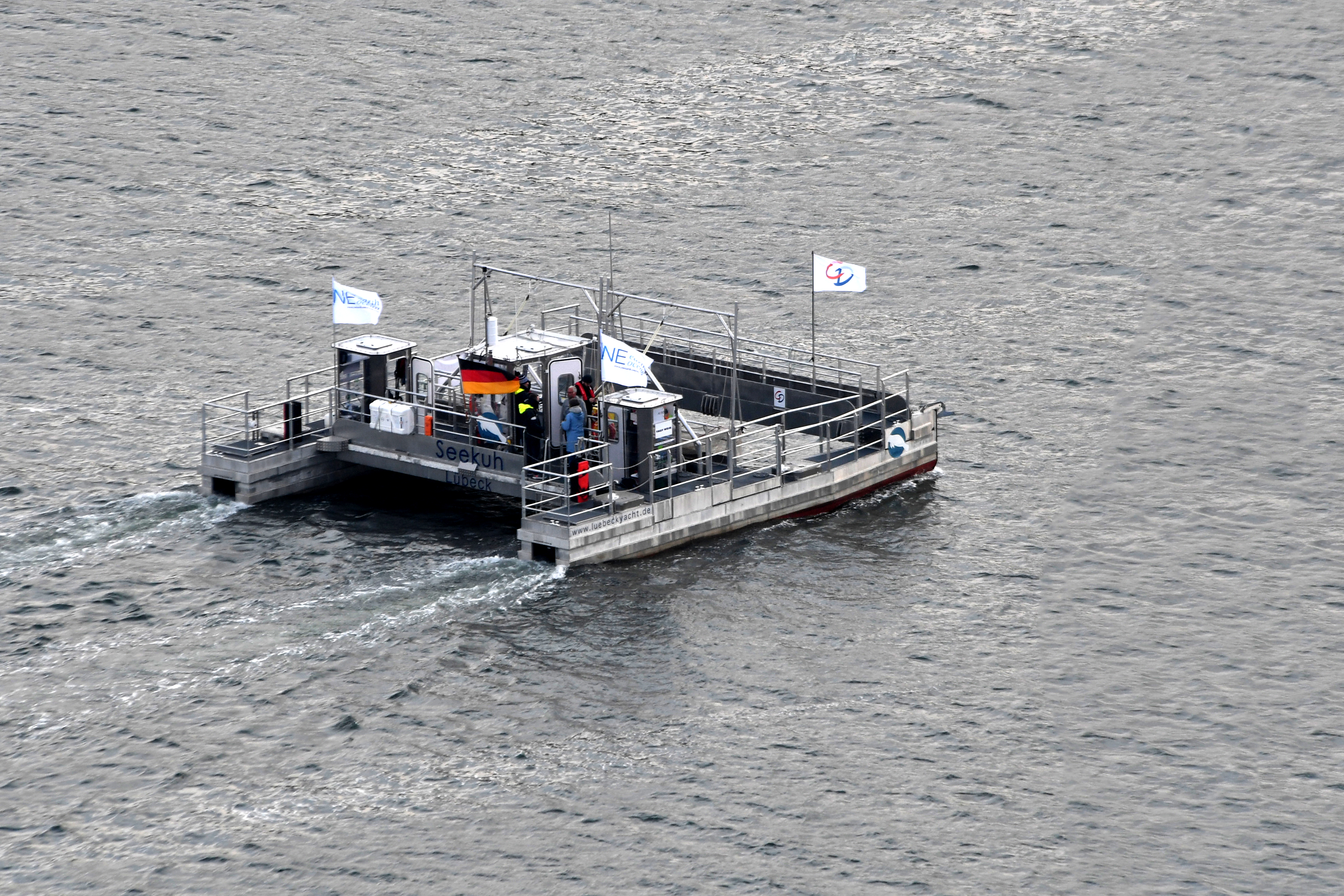 Das Schiff Seekuh auf der Trave zurück von der Ostsee